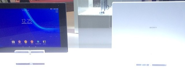 Uploaded via Instagram ift.tt/OBVJBJ